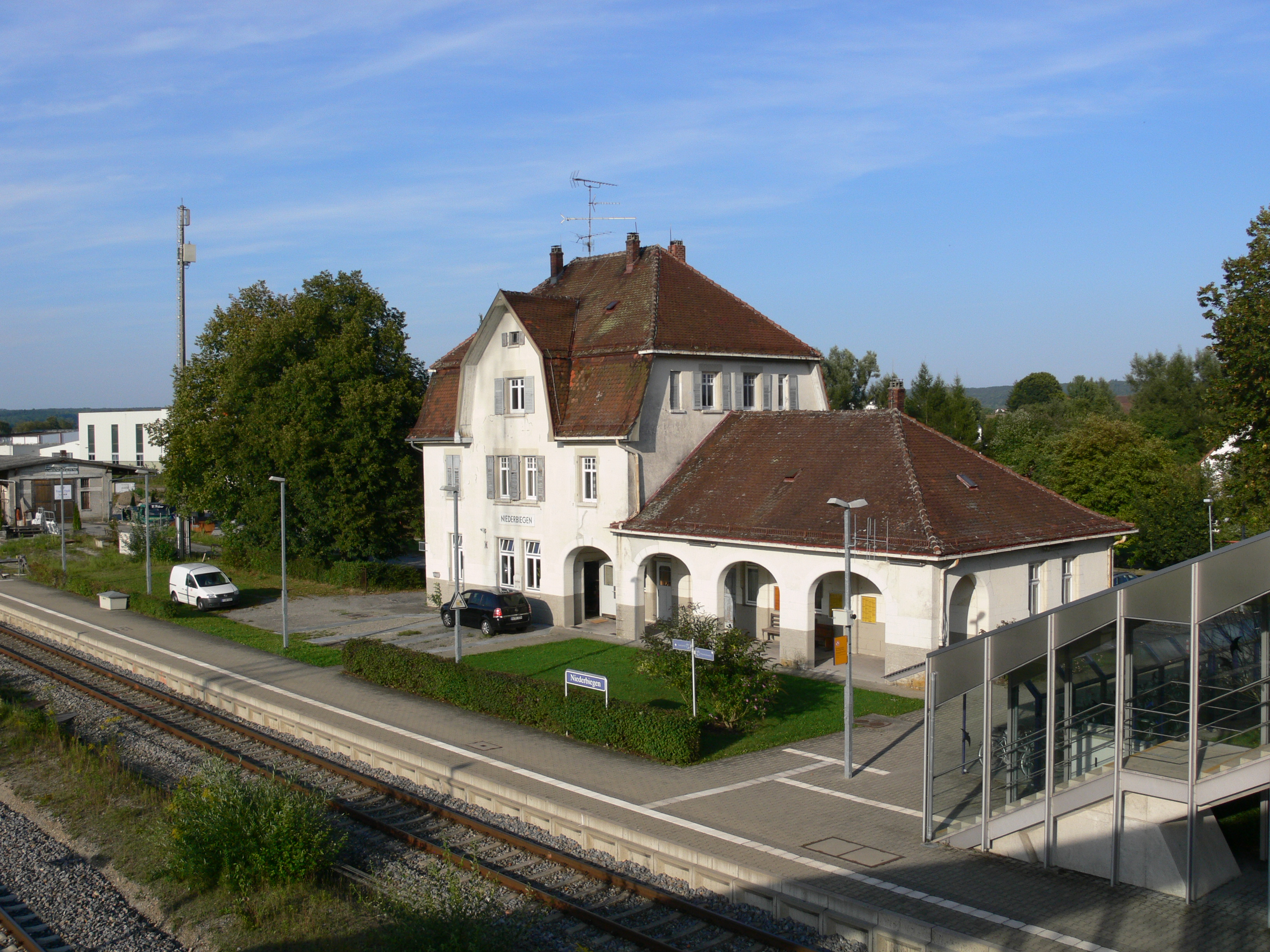 Bahnhof Niederbiegen